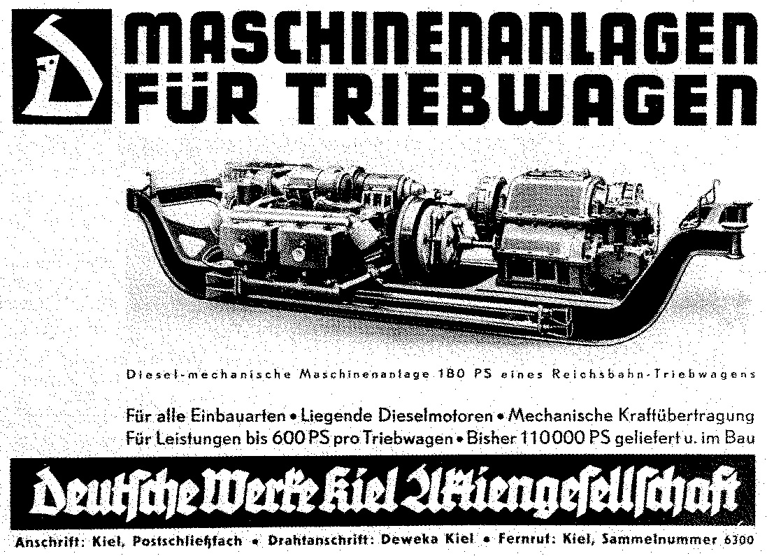 Unterflurantrieb bei den DWK-Triebwagen